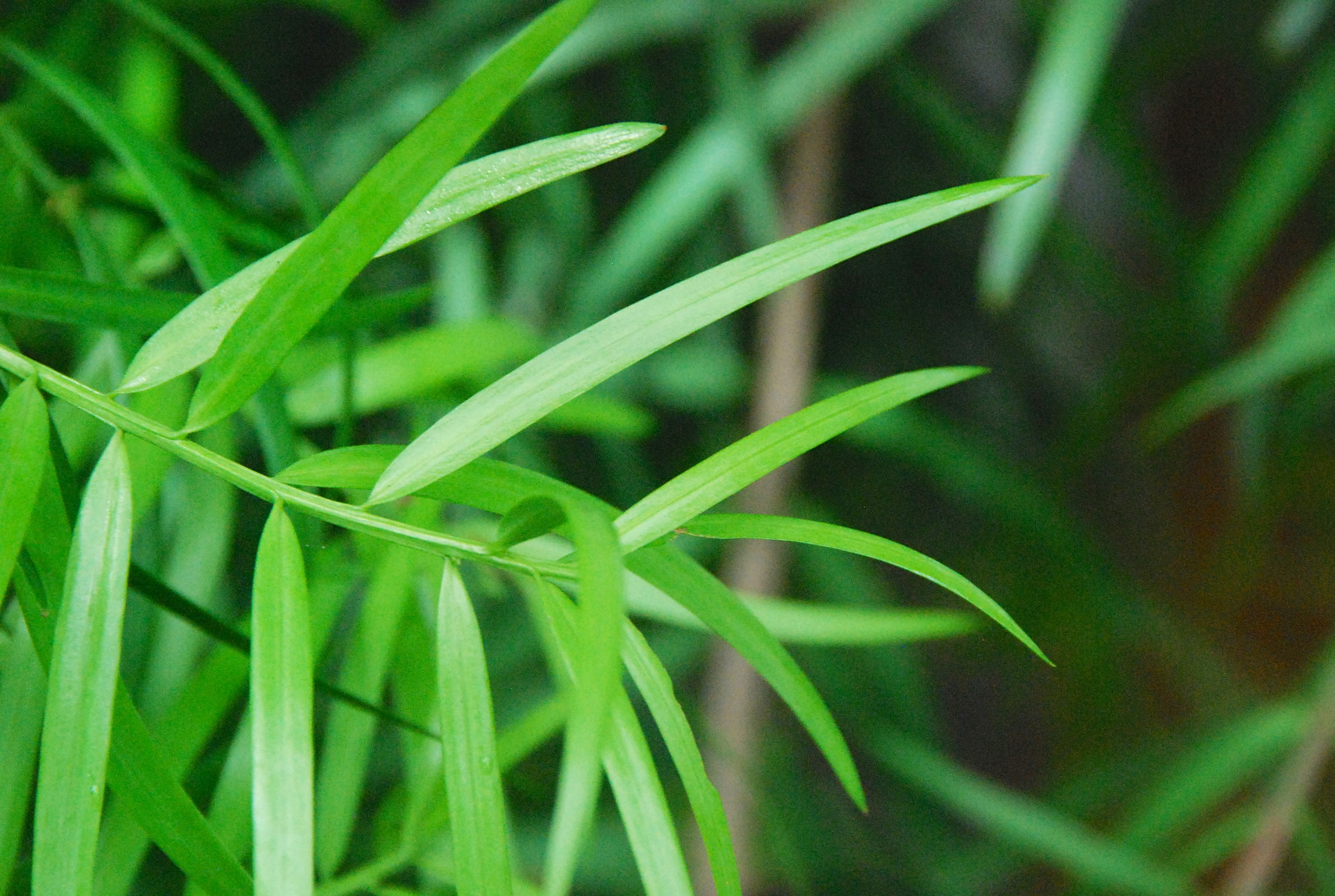 Podocarpus gaussenii au Conservatoire botanique national de Brest.